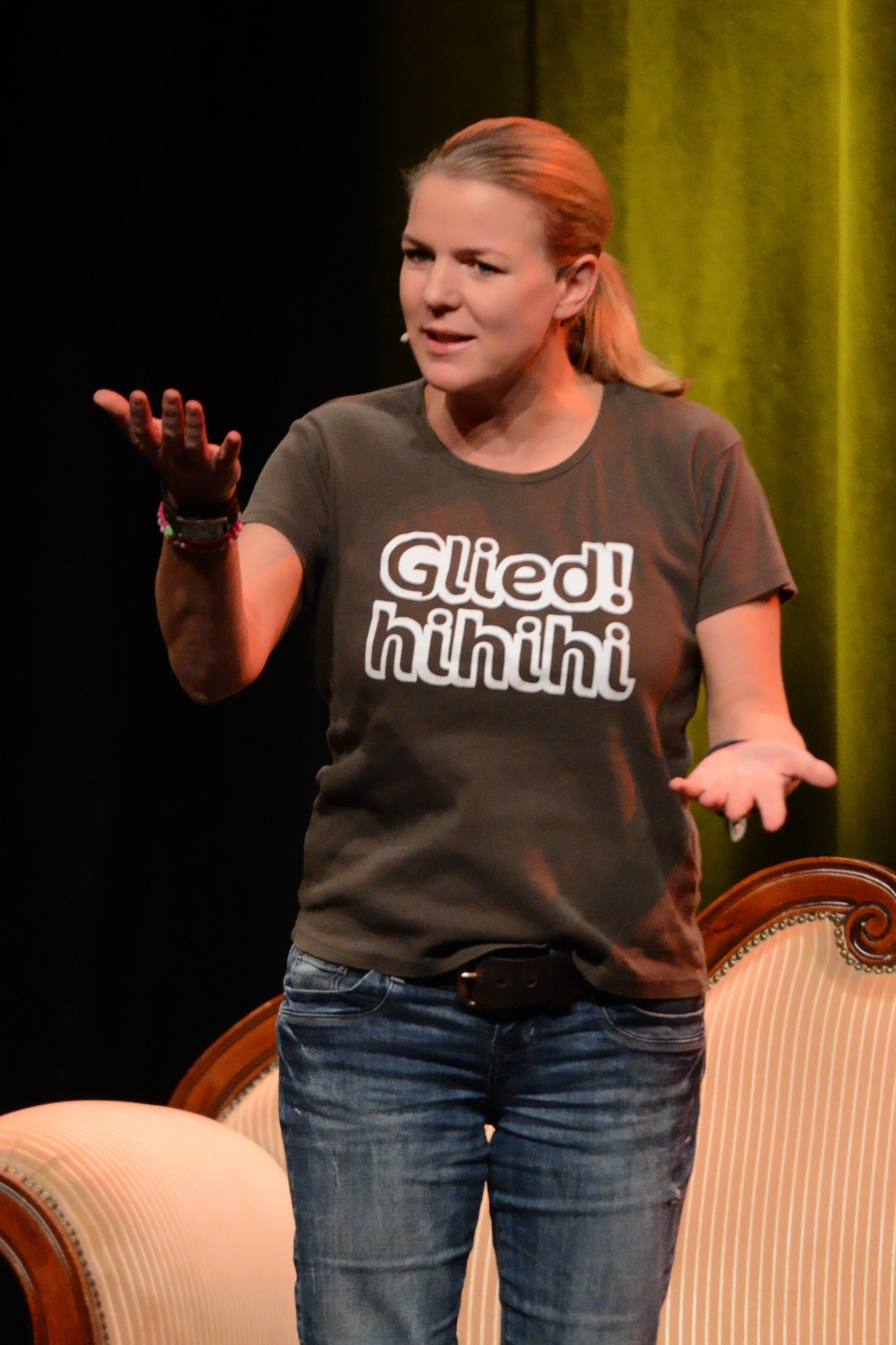 Mirja Boes bei einem Auftritt im Ebertbad in Oberhausen.